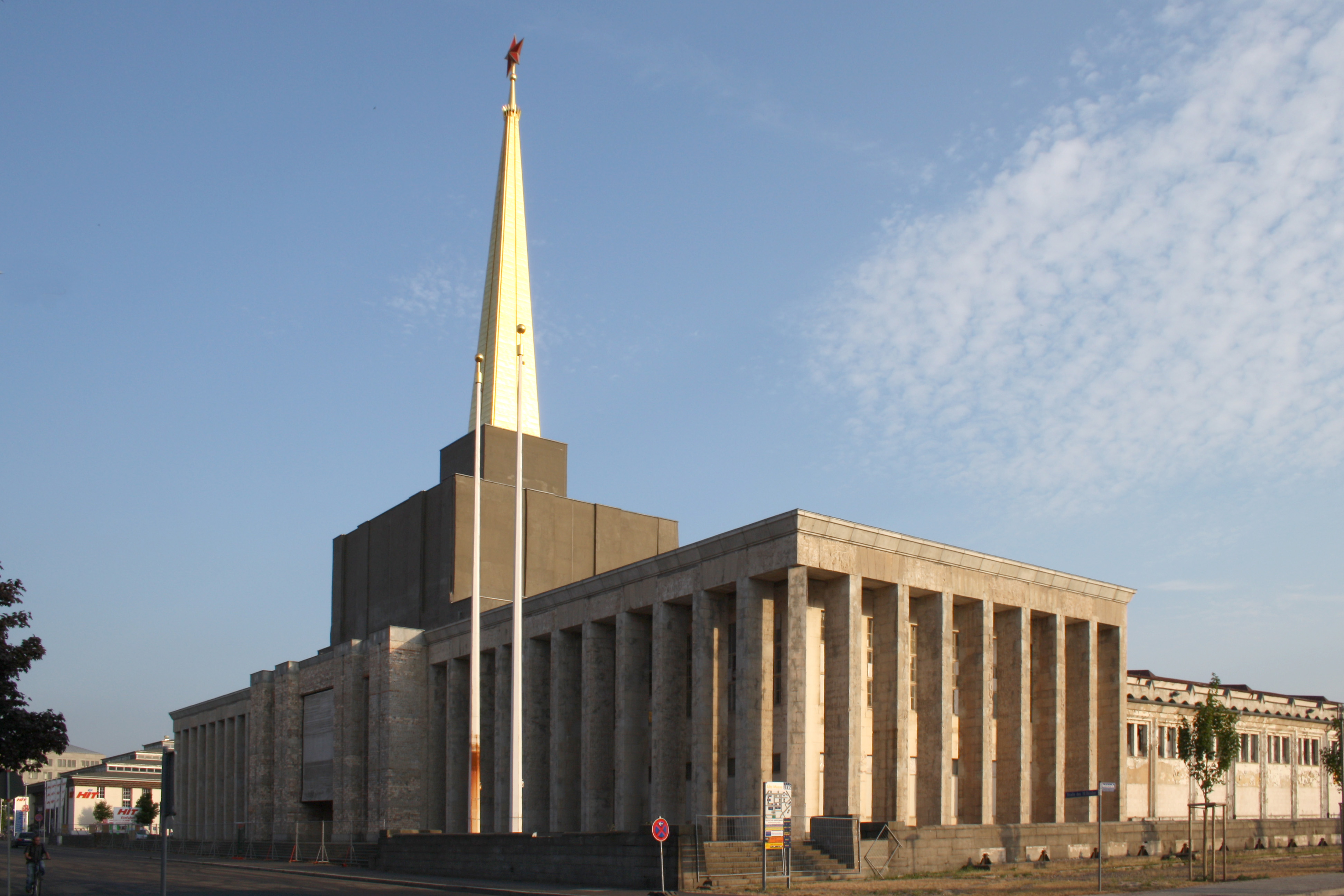 Vorderansicht des Achilleion in Leipzig.